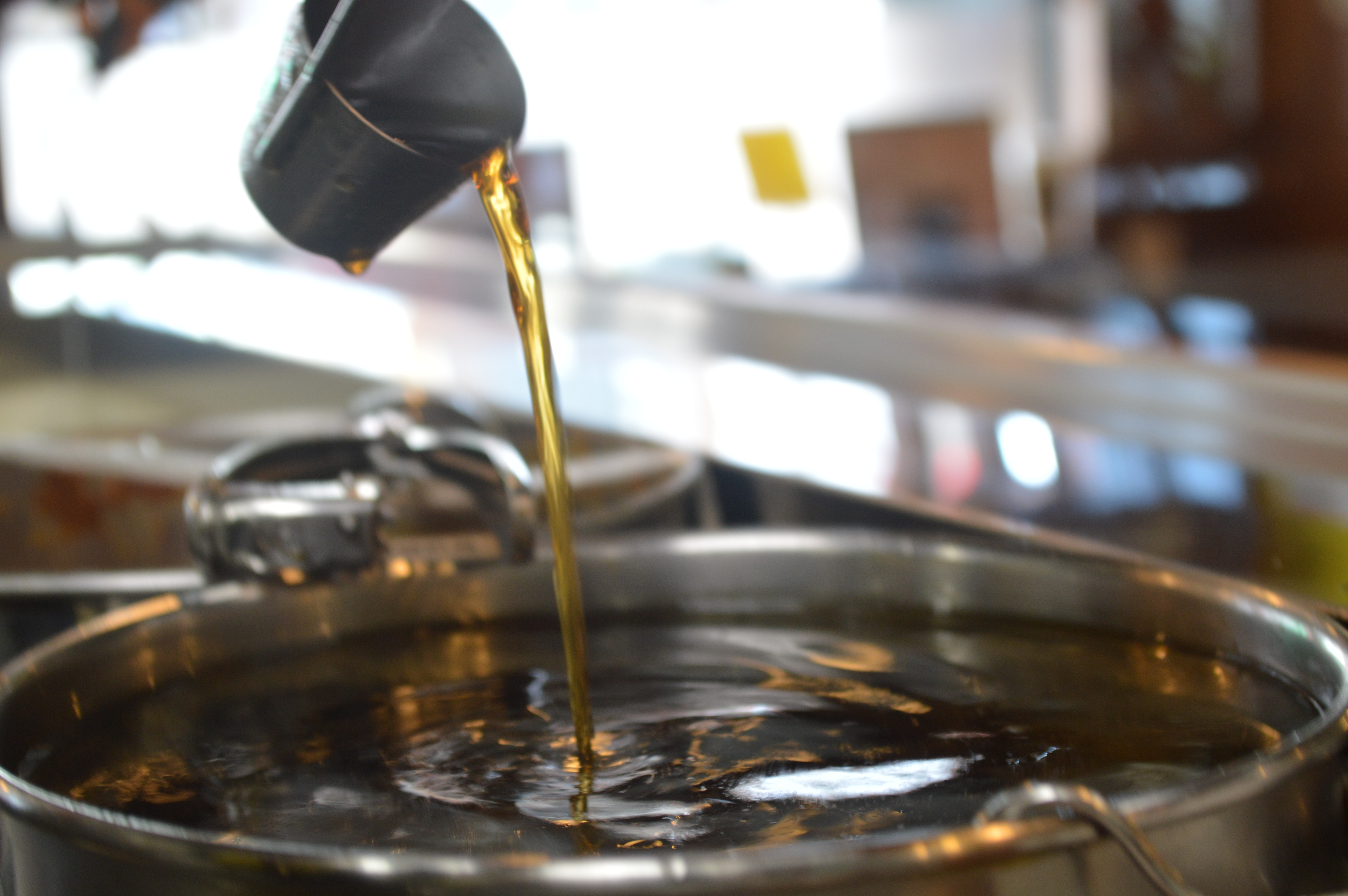 ヤマミ醸造たまり醤油